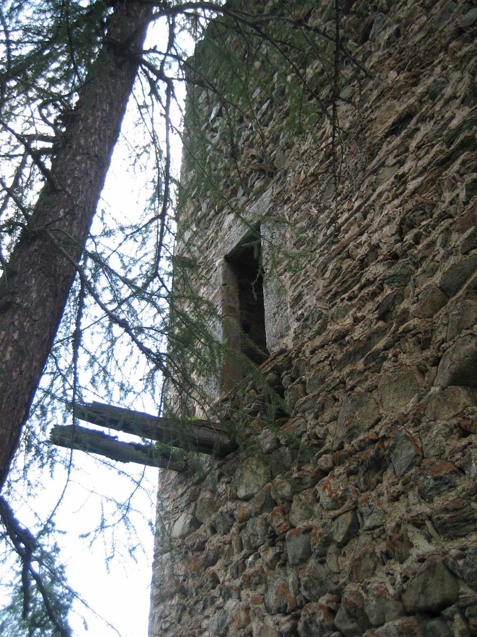 Hocheingang